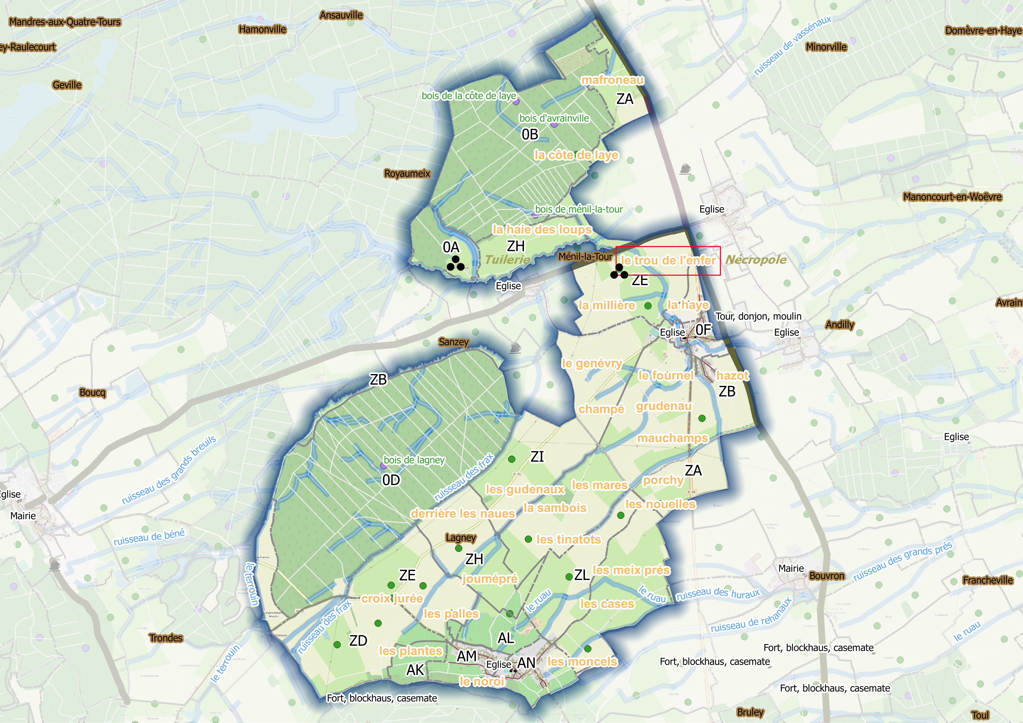 Fig1. Ménil-la-Tour (ban communal)